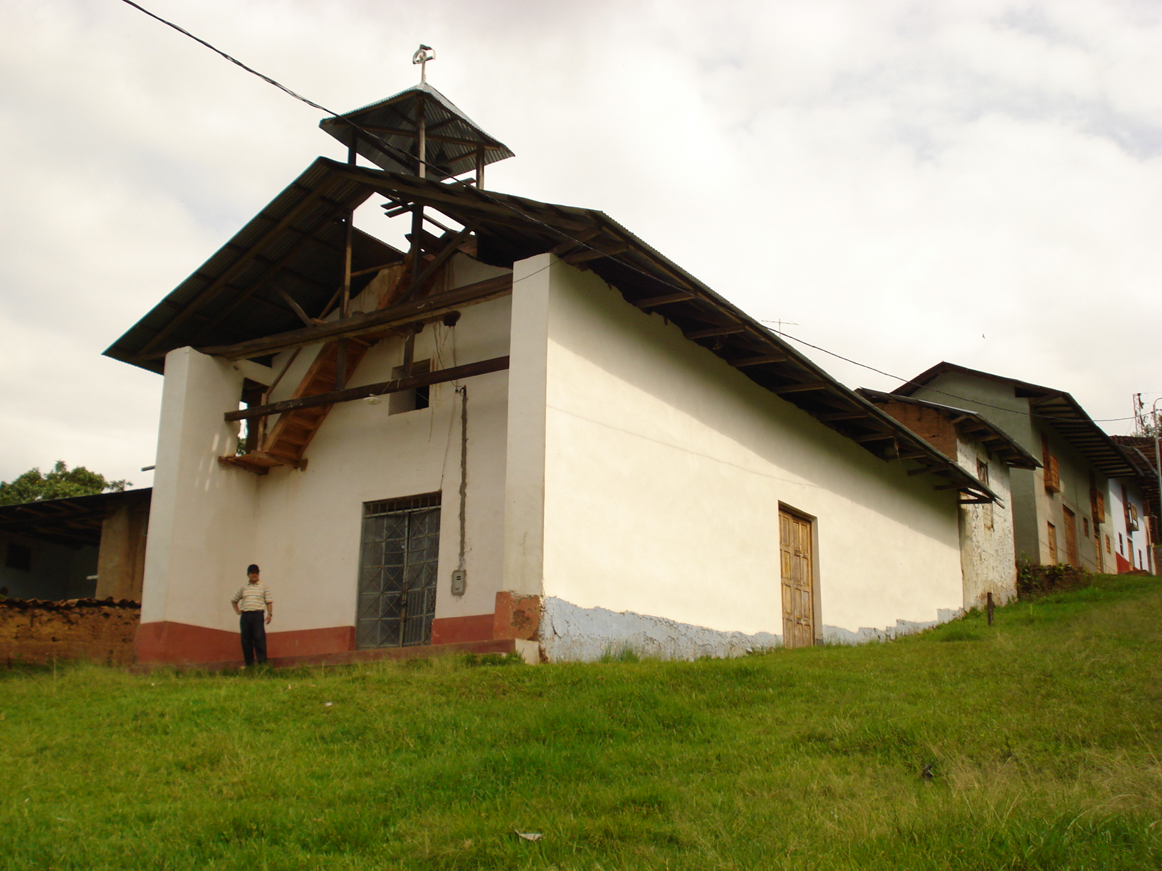 Foto de la Iglesia de Caldera